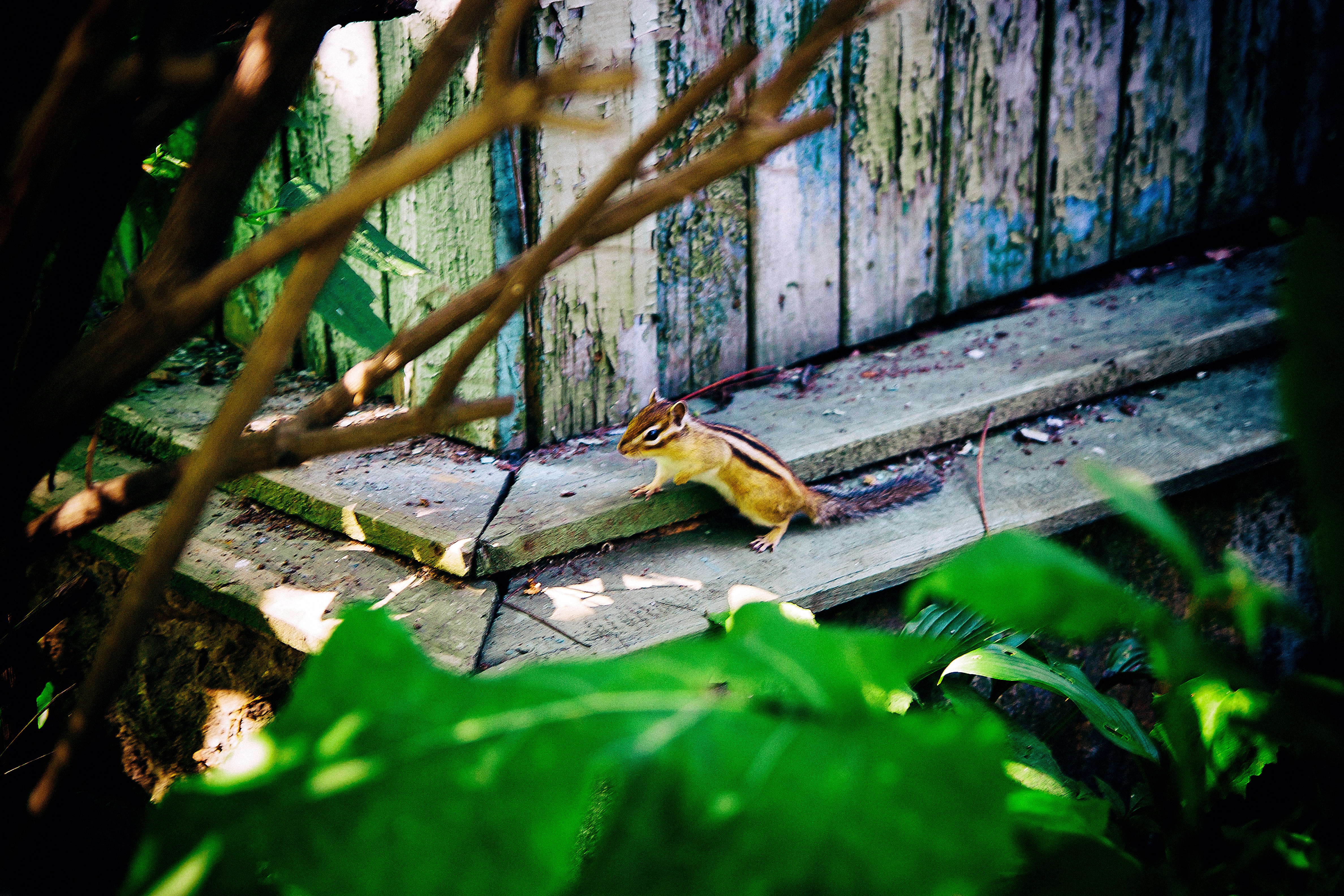 Ботанический сад-институт ДВО РАН: Расположен на полуострове Муравьева-Амурского, в черте города Владивостока, в 19 км к северу от его центра,Владивостокский городской округ, Приморский край This image is related to the protected area of Russia number 2500021